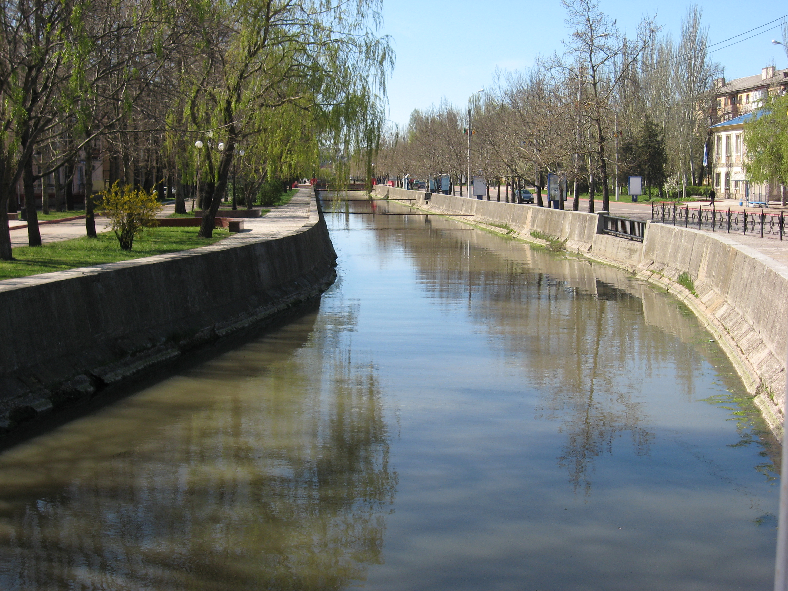 Керчь. Речка Приморская ( Мелек-Чесме )